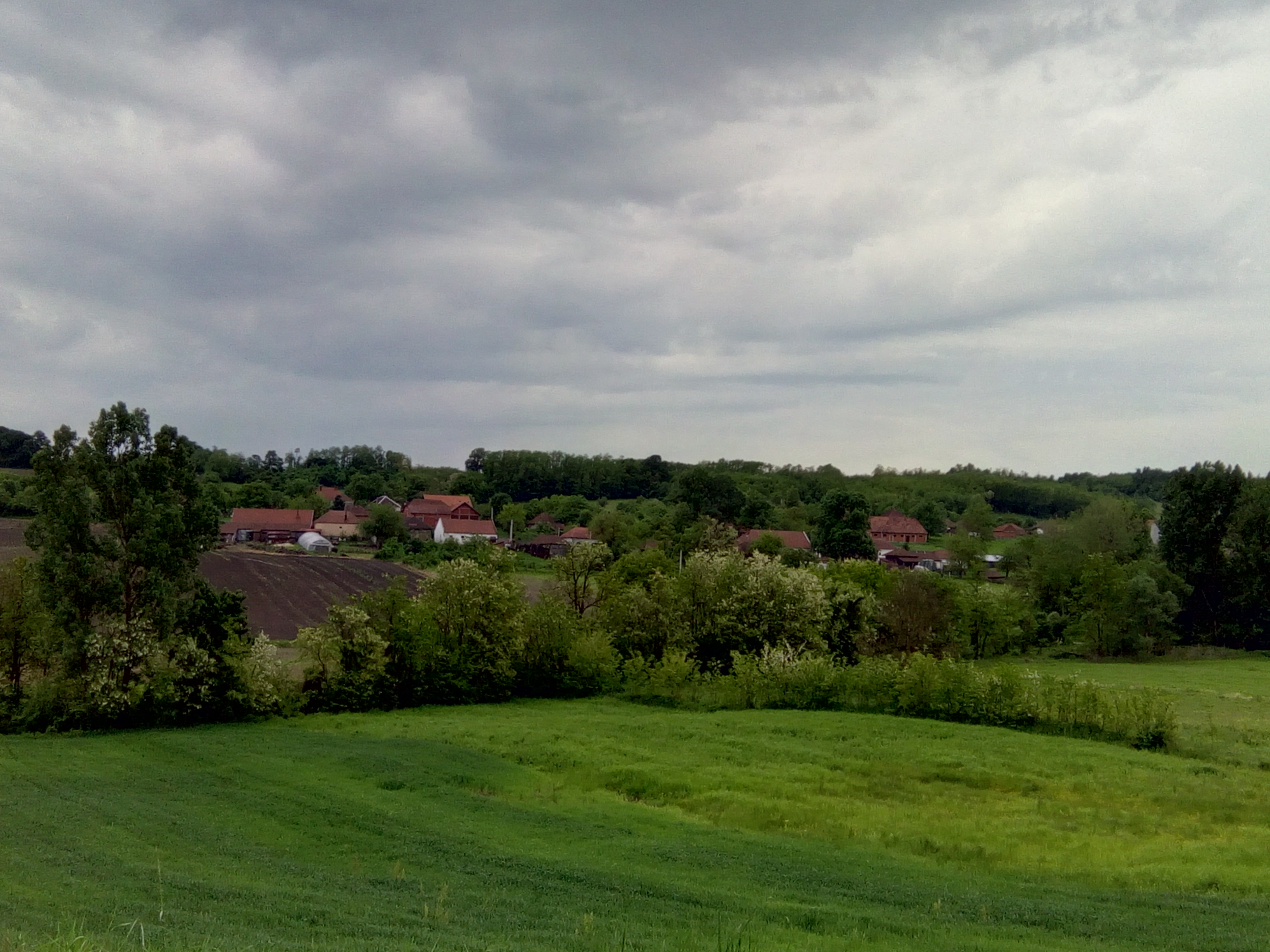 Srpski (latinica): Pogled na selo Trska